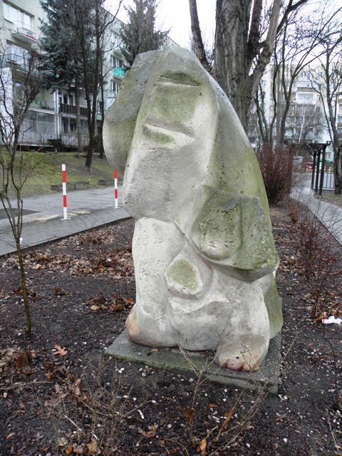 autor: Marek Jerzy Moszyński - polski artysta, rzeźbiarz